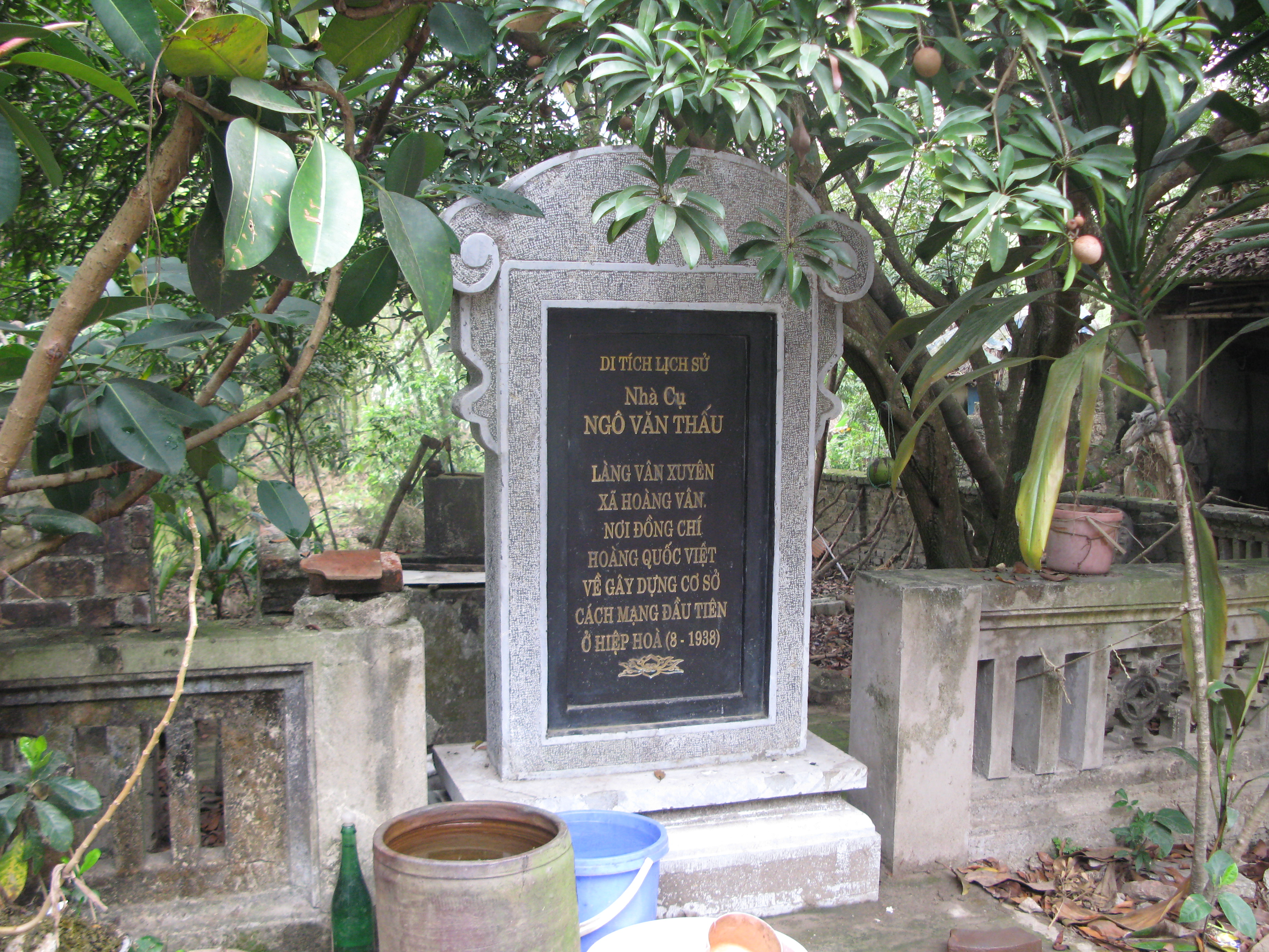 Di tích lịch sử nhà cụ Ngô Văn Thấu làng Vân Xuyên xã Hoàng Vân, nơi đồng chí Hoàng Quốc Việt về gây dựng cơ sở cách mạng đầu tiên ở Hiệp Hòa (8-1938)